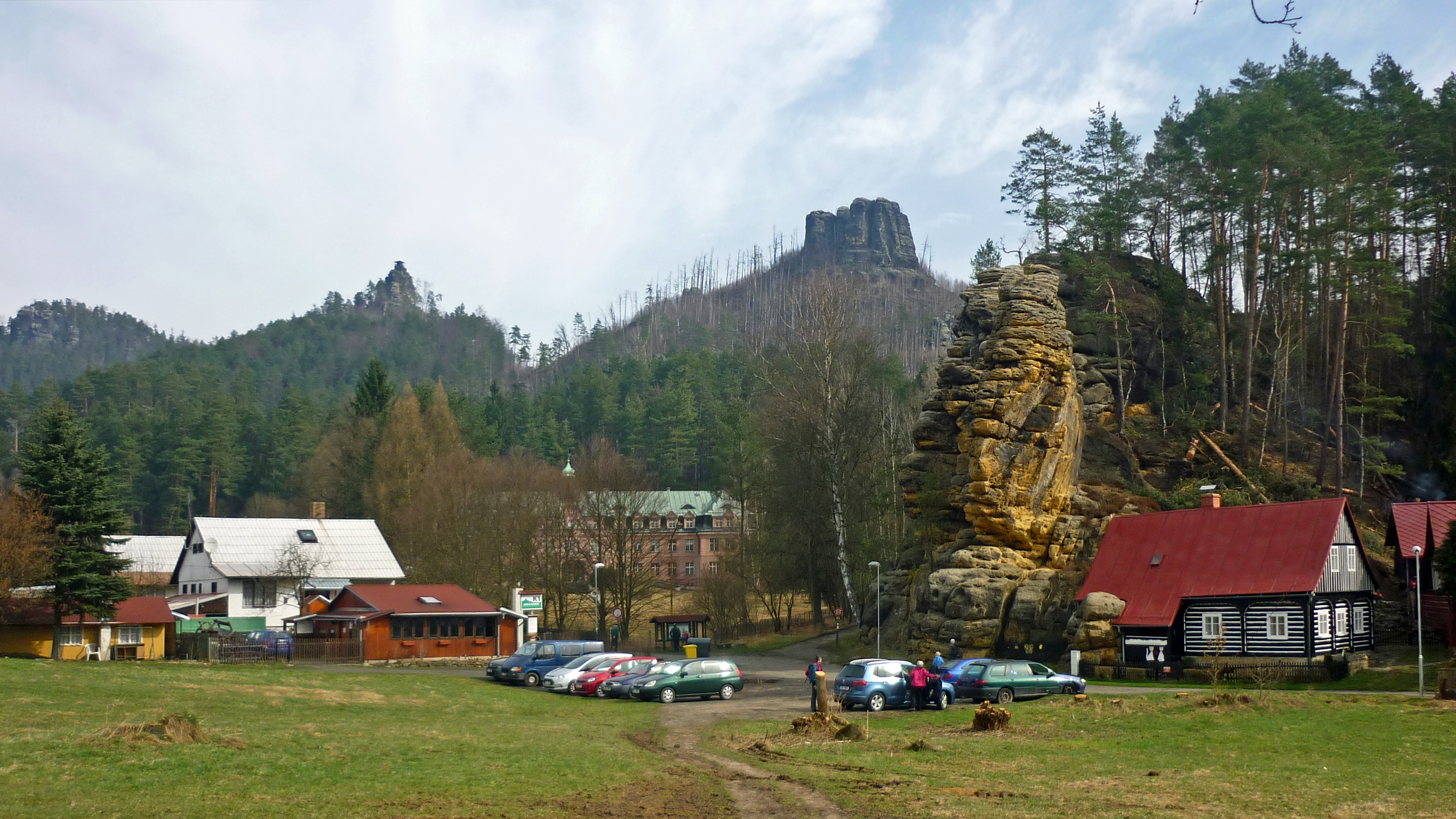 Am Turmfalkenkegel in Jetřichovice (Dittersbach): Blick auf Wilhelminenwand, Marienfels und Falkenstein